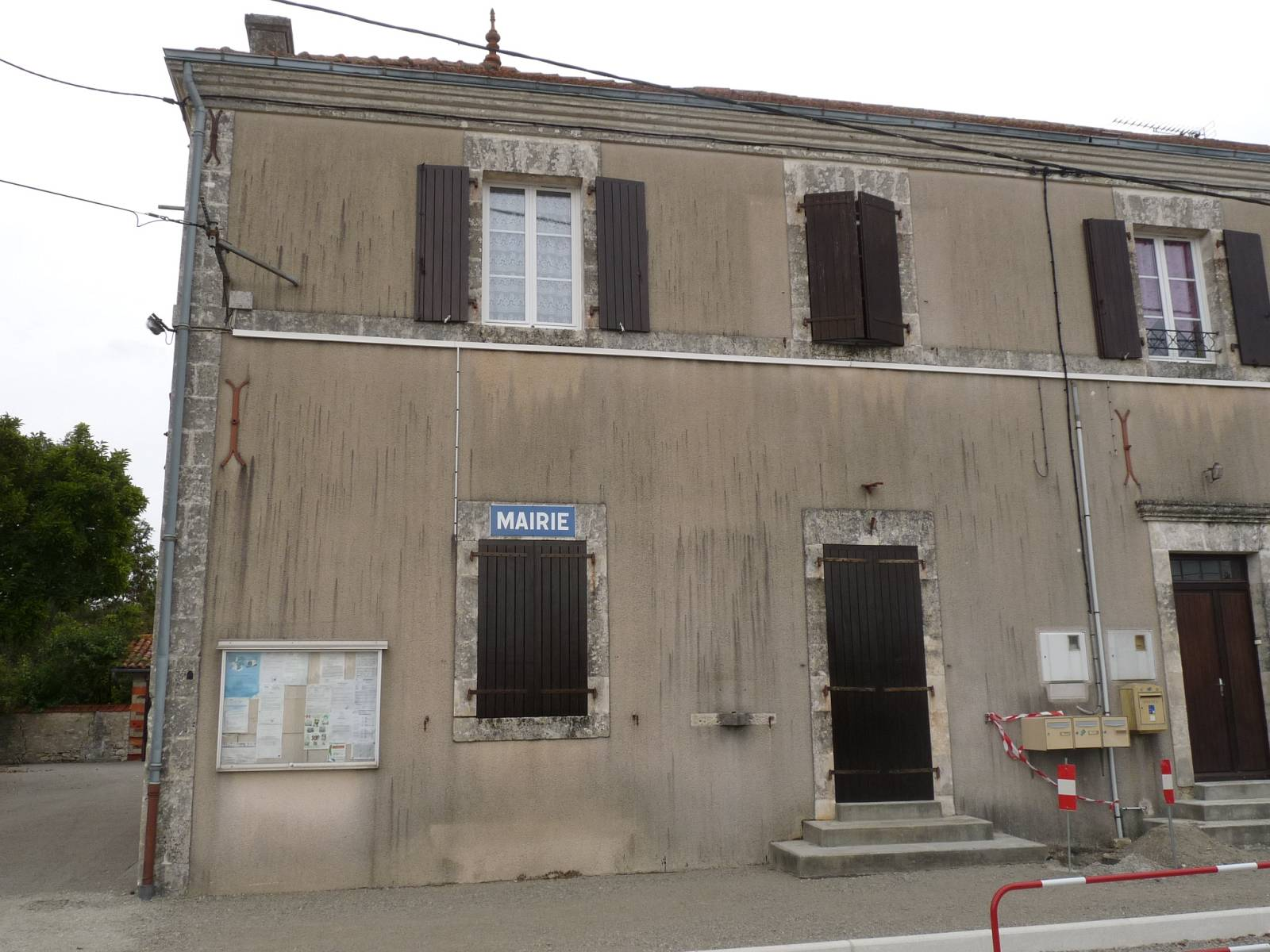 mairie de St-Coutant, Charente, France